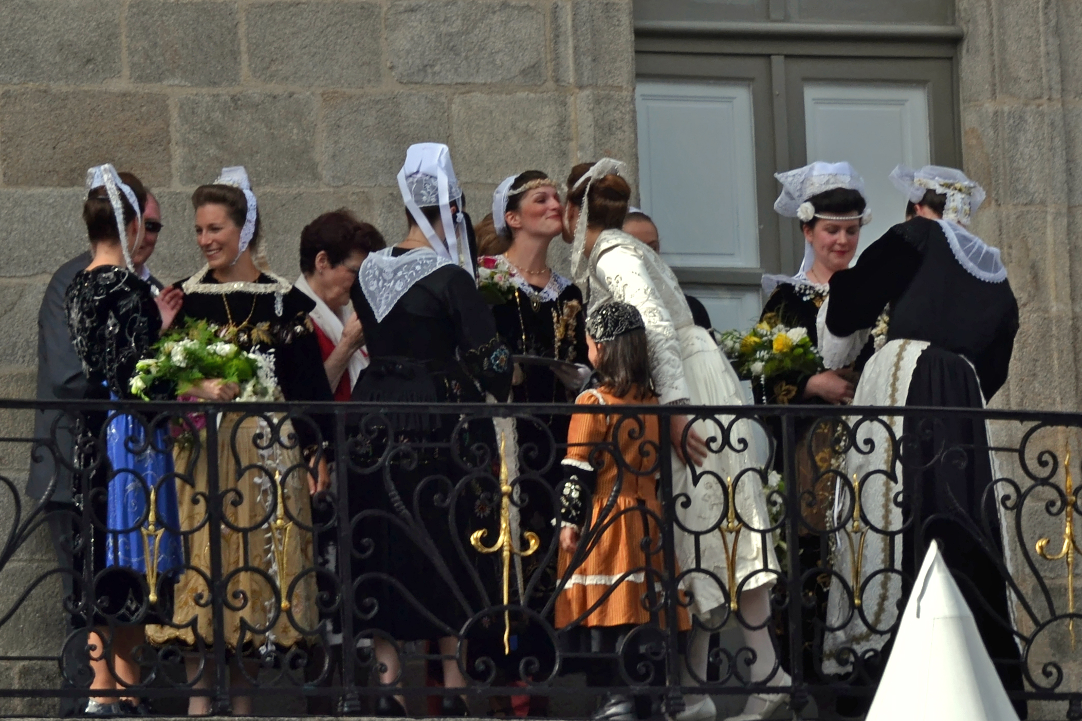 Annonce des résultats de l'élection de la Reine de Cornouaille au balcon du Musée Départemental Breton lors du « Kemper en Fête » le dimanche 28 juillet 2013 dans le cadre du Festival de Cornouaille.